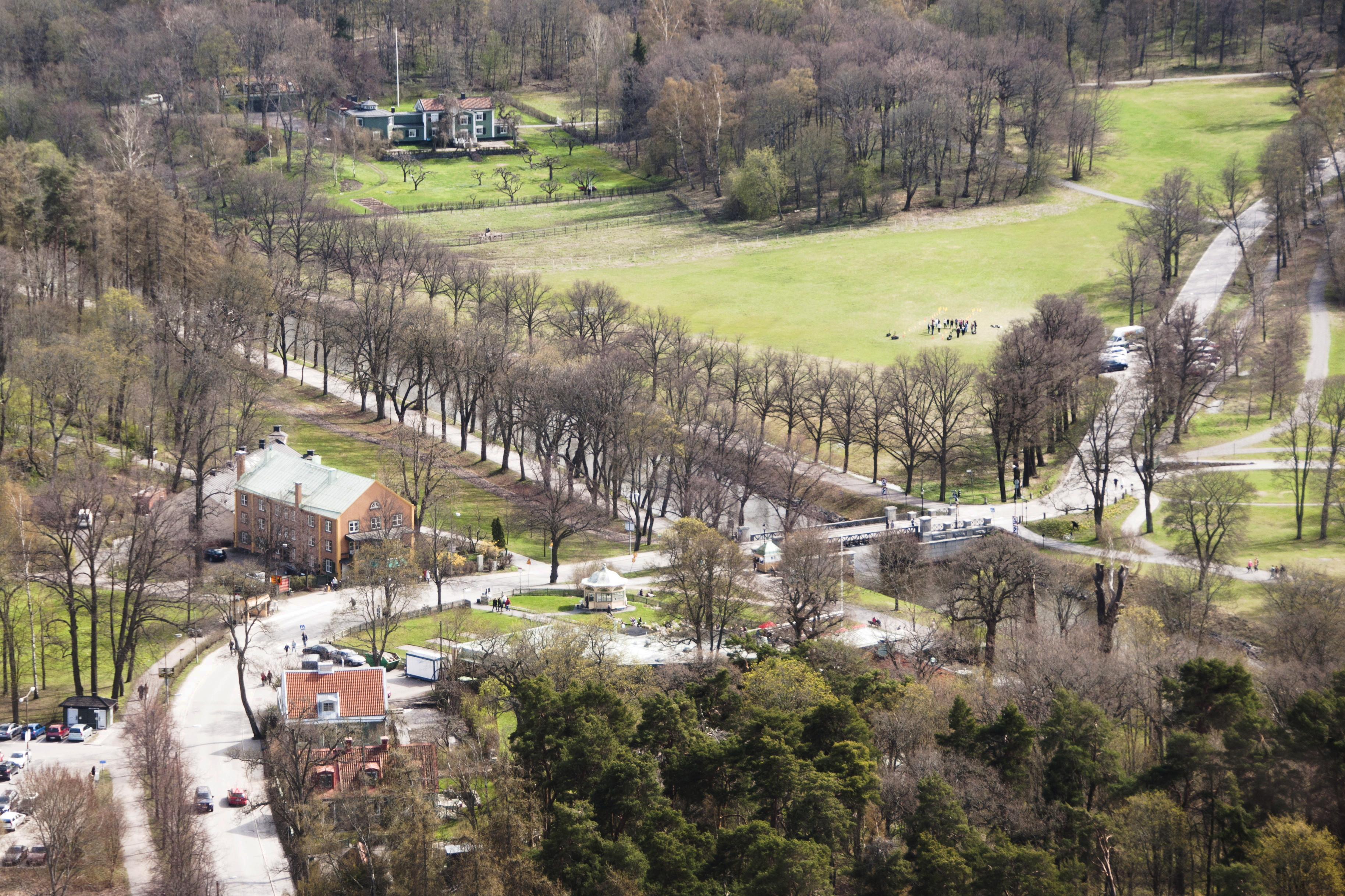 Djurgårdsbrunn sedd från Kaknästornet